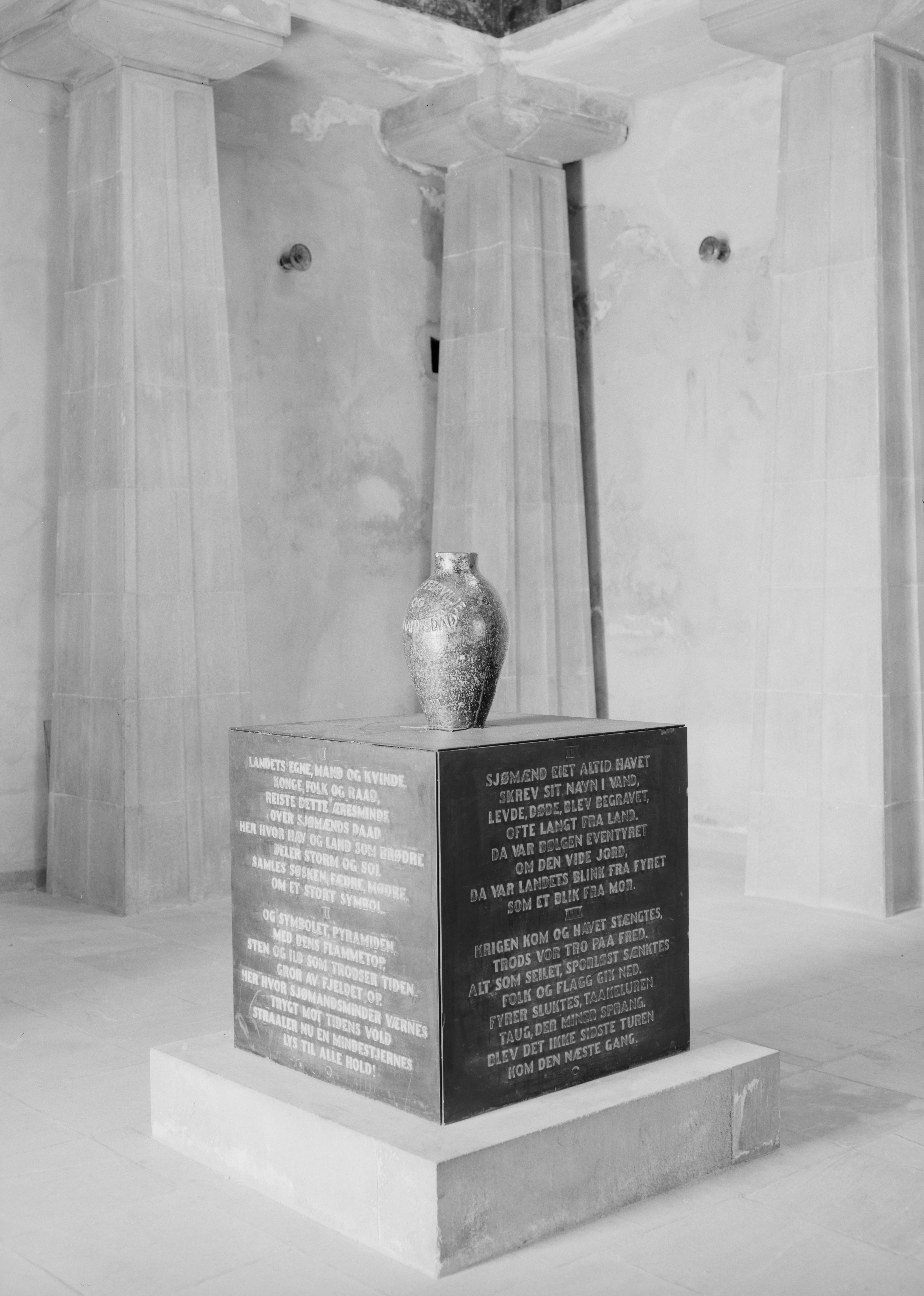 Bildet er hentet fra Nasjonalbibliotekets bildesamling Stavern, Larvik, Vestfold